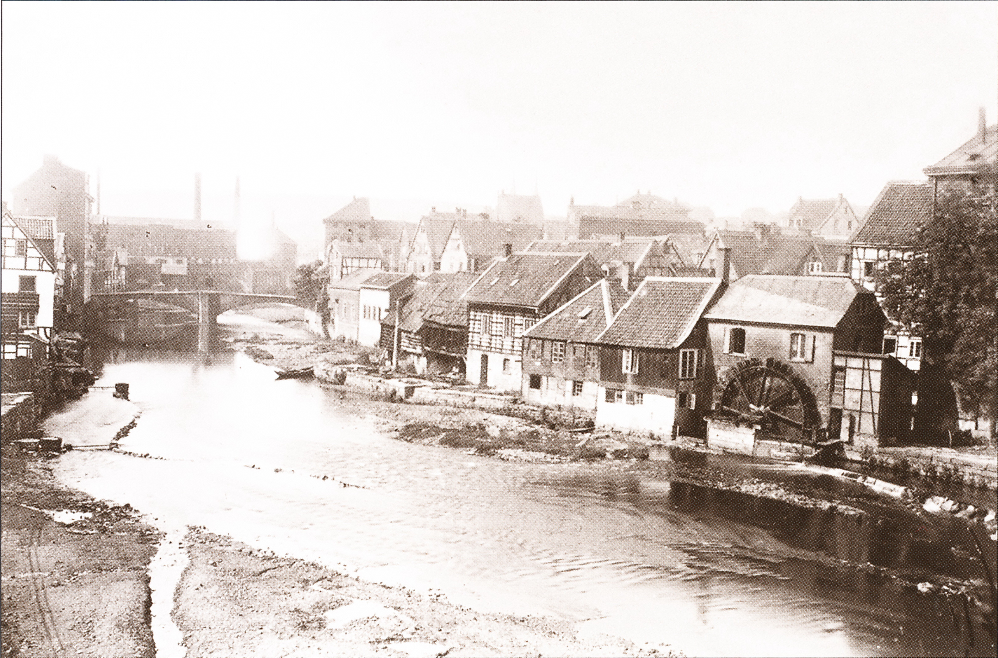 Mühlenschütt in Elberfeld